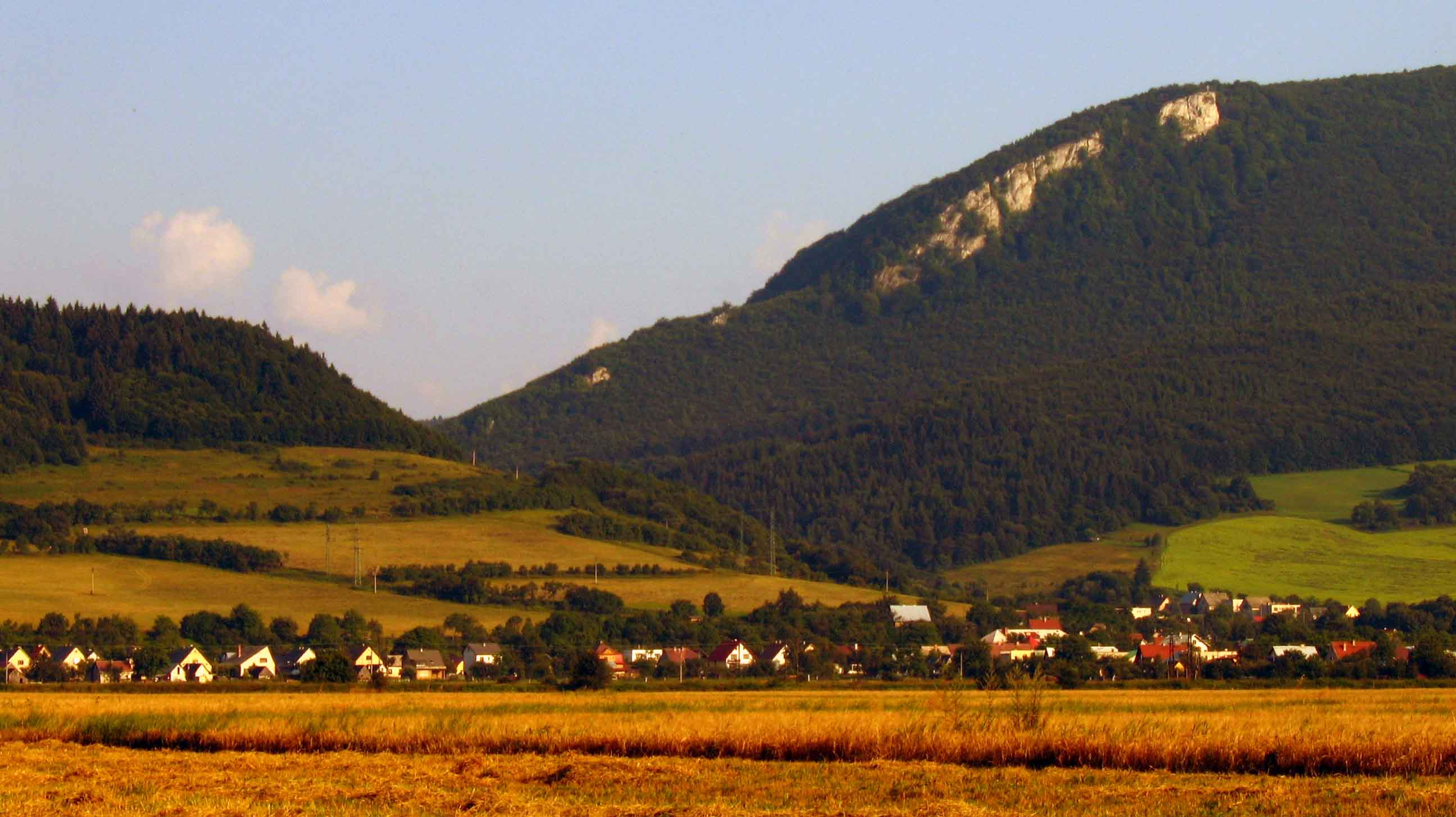 plevnik od vahu